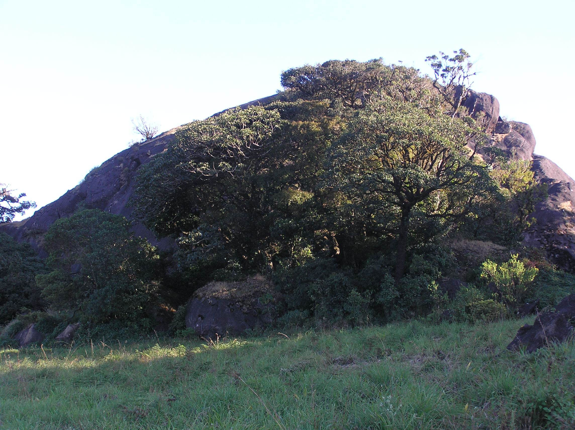 Munikal Caves